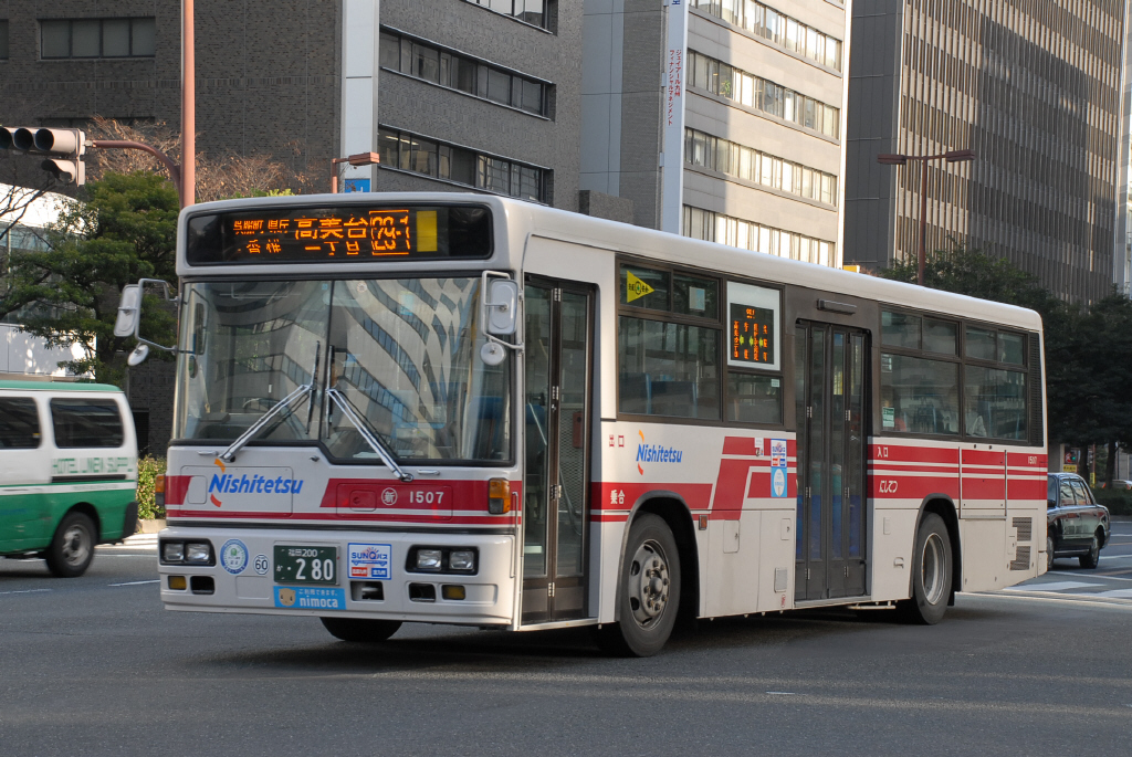 天神付近にて、2009-12-27撮影